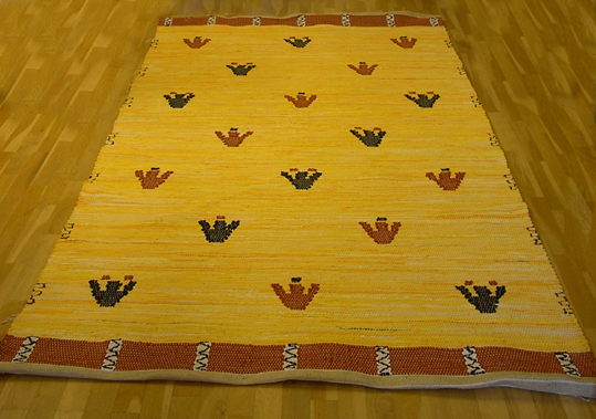 Trasmatta med inplock.